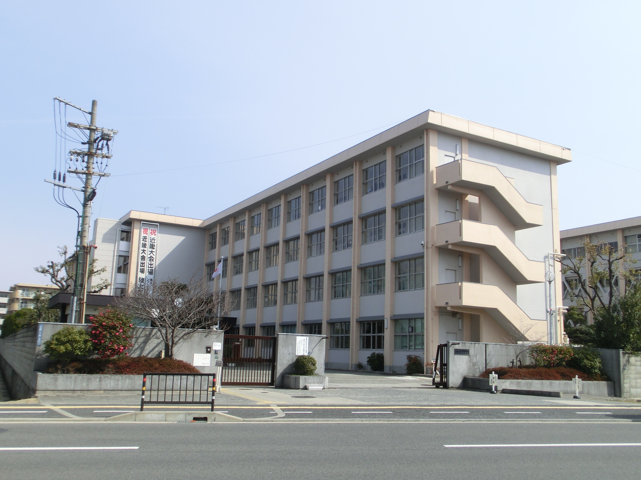 大阪府立和泉高等学校